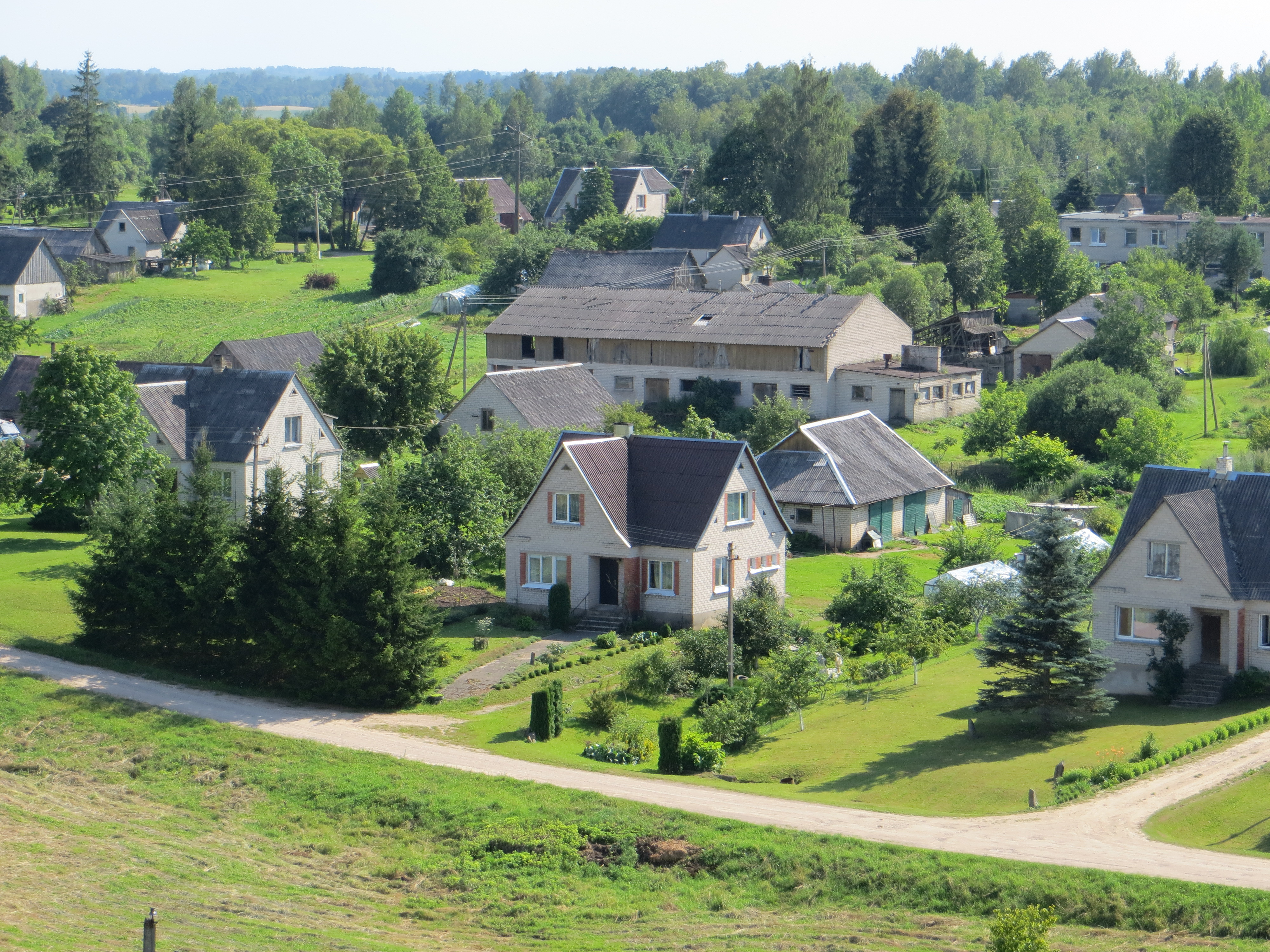 Daugailių sen., Lithuania